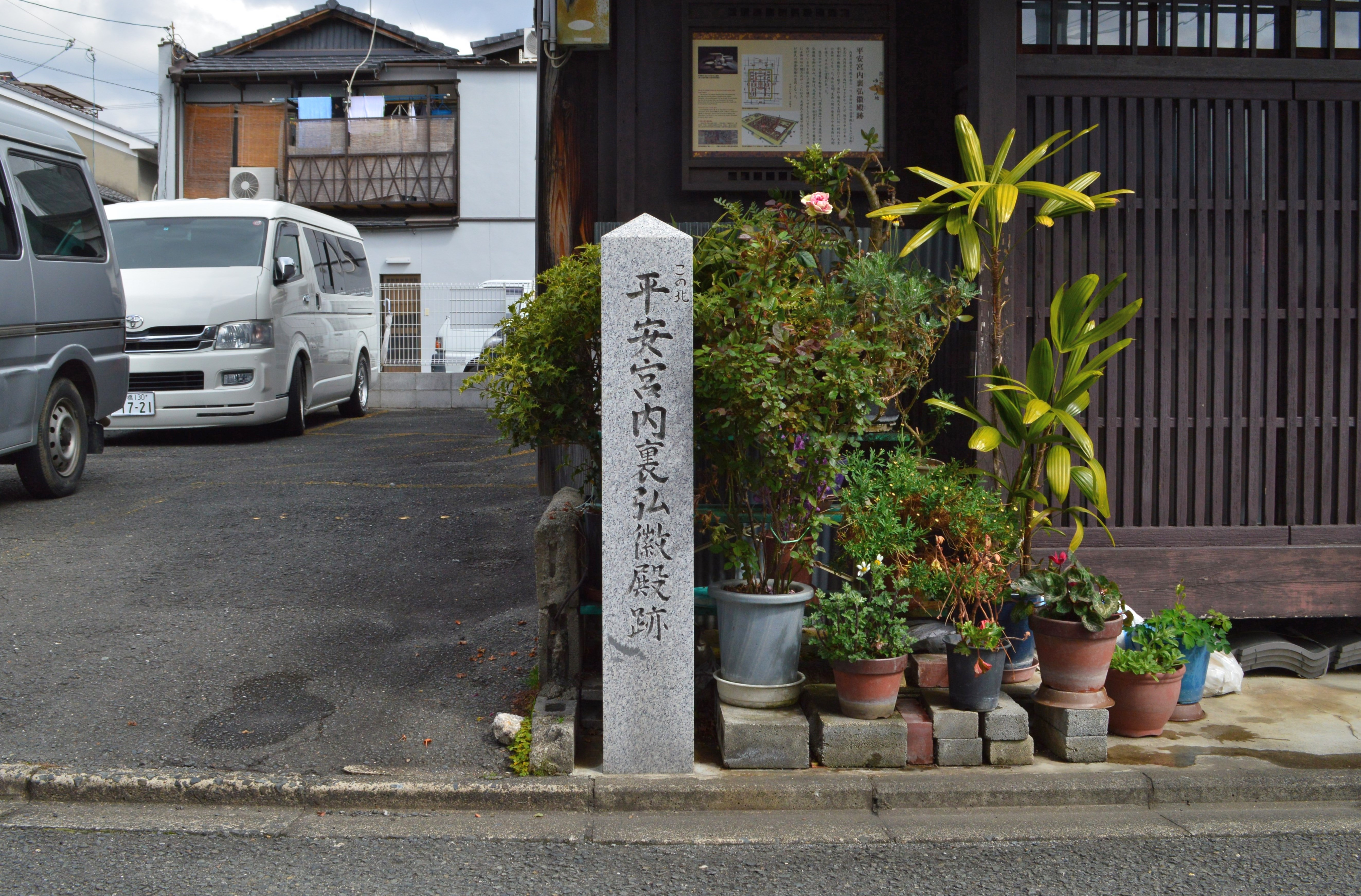 平安京大内裏 弘徽殿跡 石碑